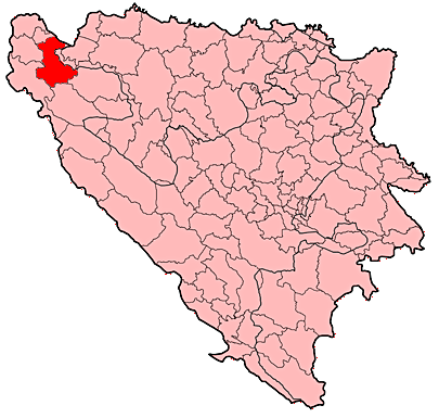 Općina Bosanska Krupa u Bosni i Hercegovini